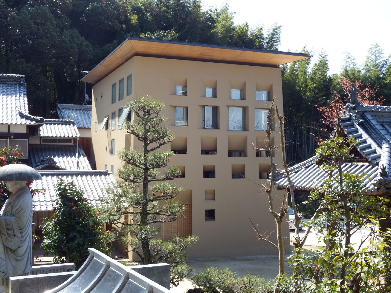 栄福寺の演仏堂